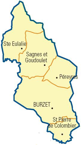 Carte détaillée des communes du canton (Ardèche)